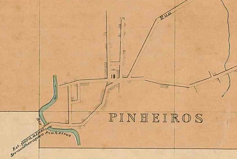 Vila dos Pinheiros na Planta Geral da Cidade de São Paulo (1905), por Alexandre Mariano Cococi e Luiz Fructuoso L. Costa